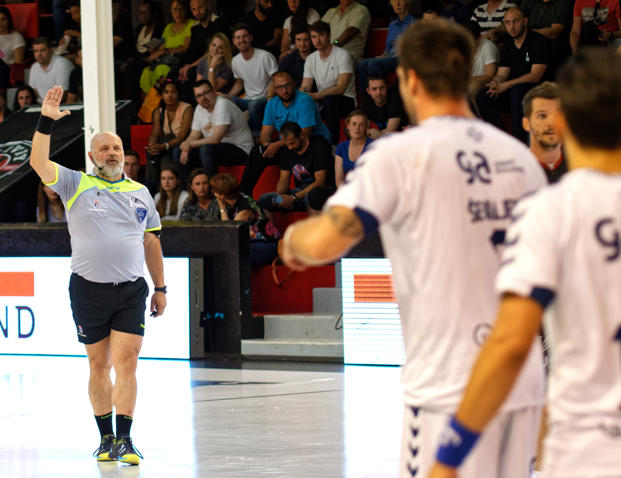 L'arbitre lève la main pour signifier le jeu passif de l'équipe attaquante. En application de la règle de 2016, les attaquants ont un maximum de 6 passes pour conclure.